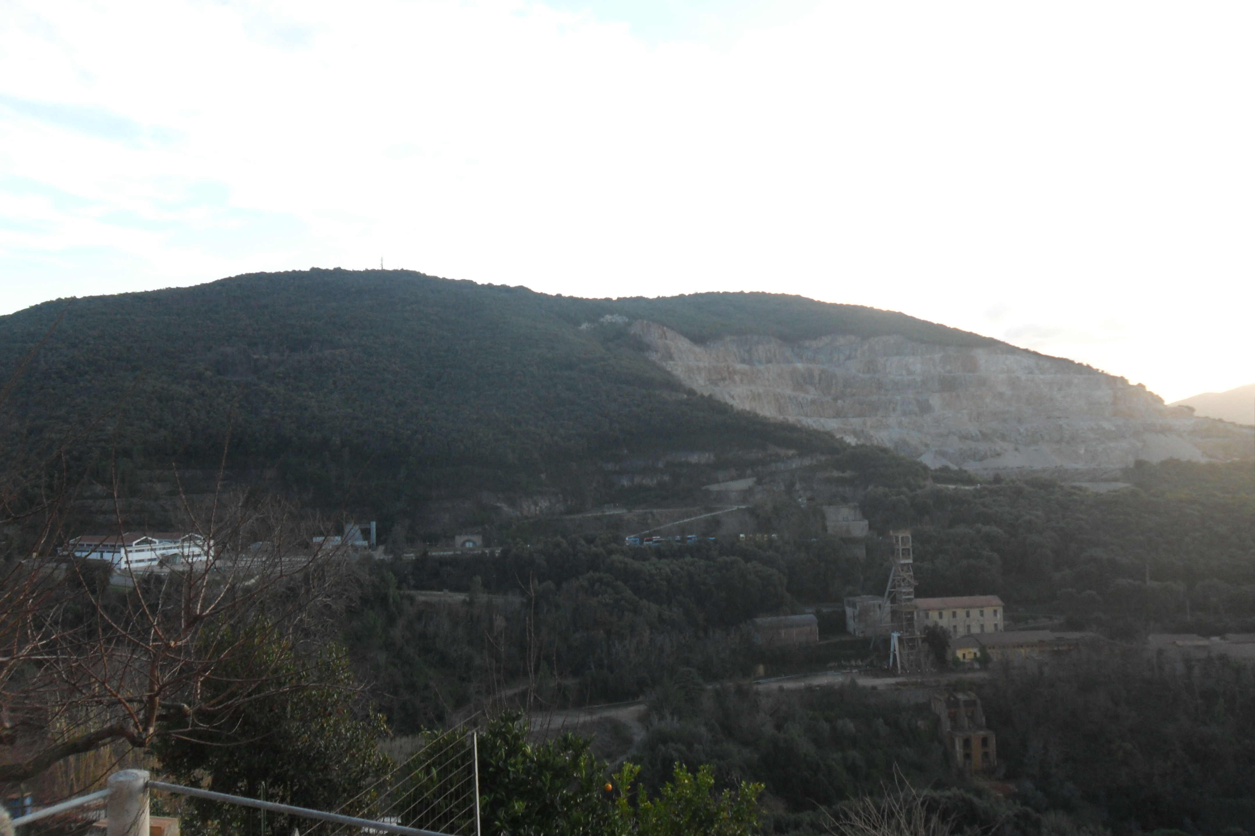 Veduta Monte Calvo e Pozzo Roma